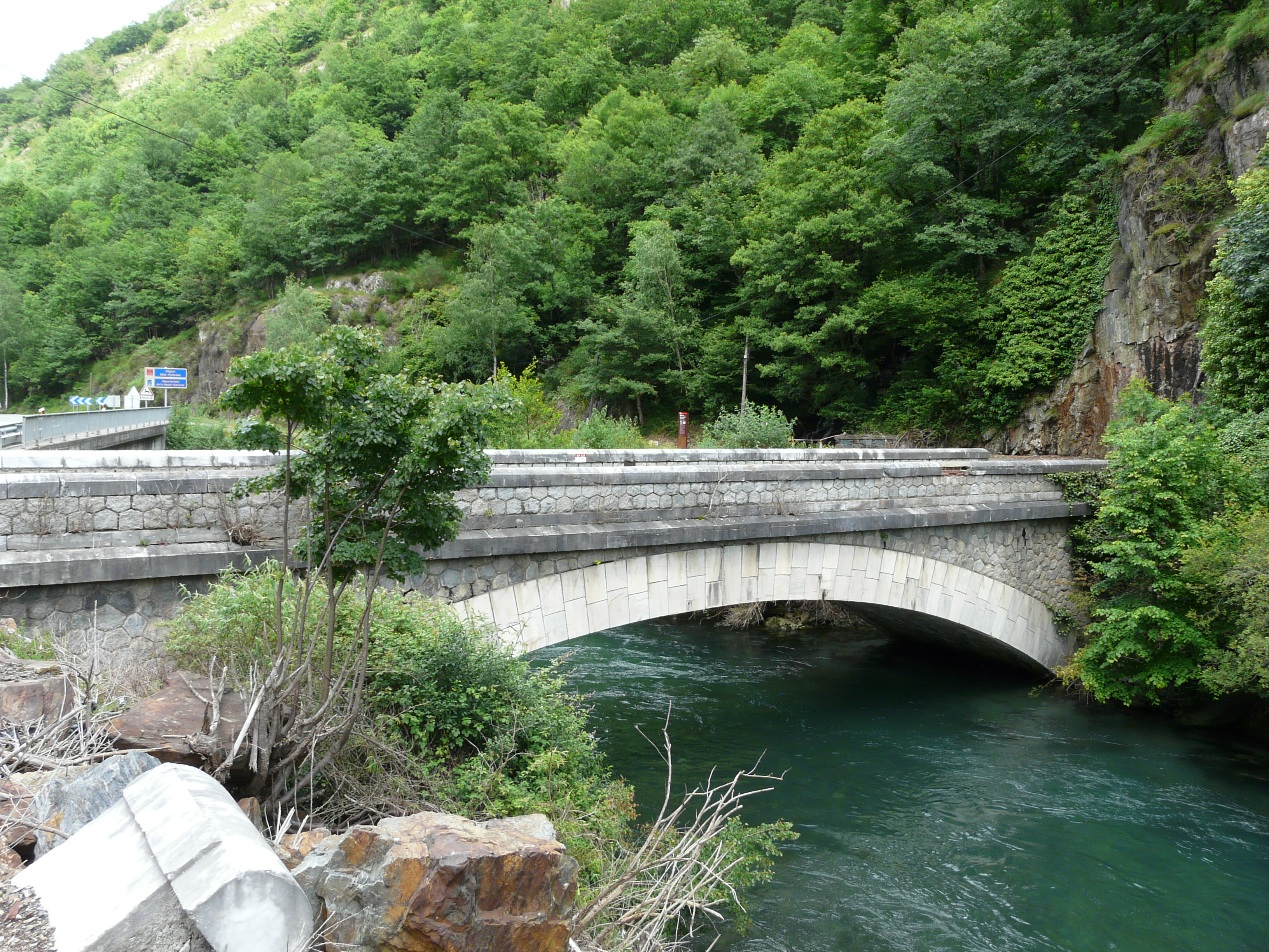 Une vingtaine de mètres en amont de la frontière entre l'Espagne et la France, le pont du Roi (ponte del Rey) franchit la Garonne. Communes espagnoles de Bausen (rive gauche), Canejan (rive droite) et française de Fos, au fond à gauche).